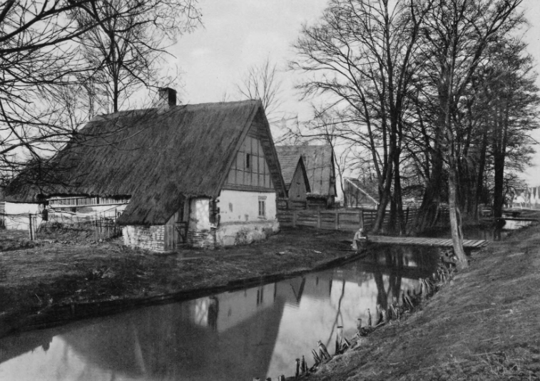 Altes Bauerngehöft in Ober Ellguth im Kreis Kreuzburg, Schlesien.